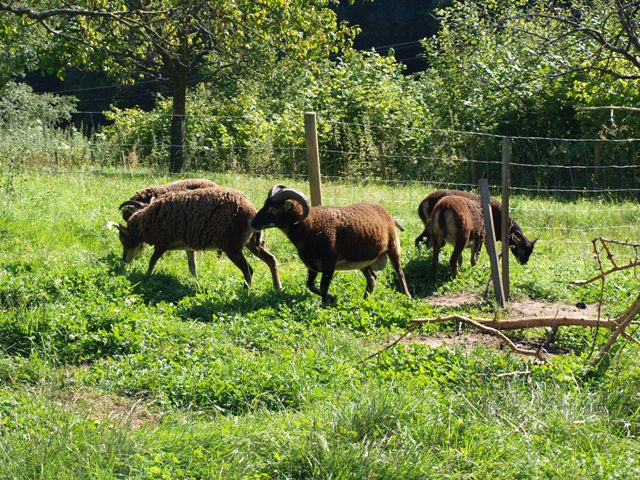 Soay-Schafe